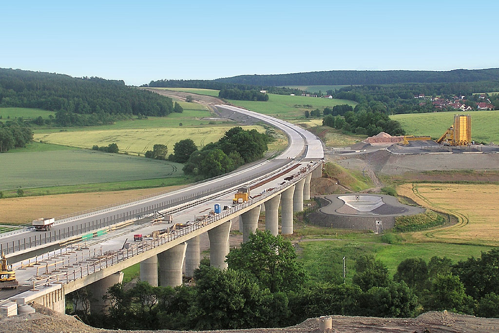 A71 Jüchsetalbrück